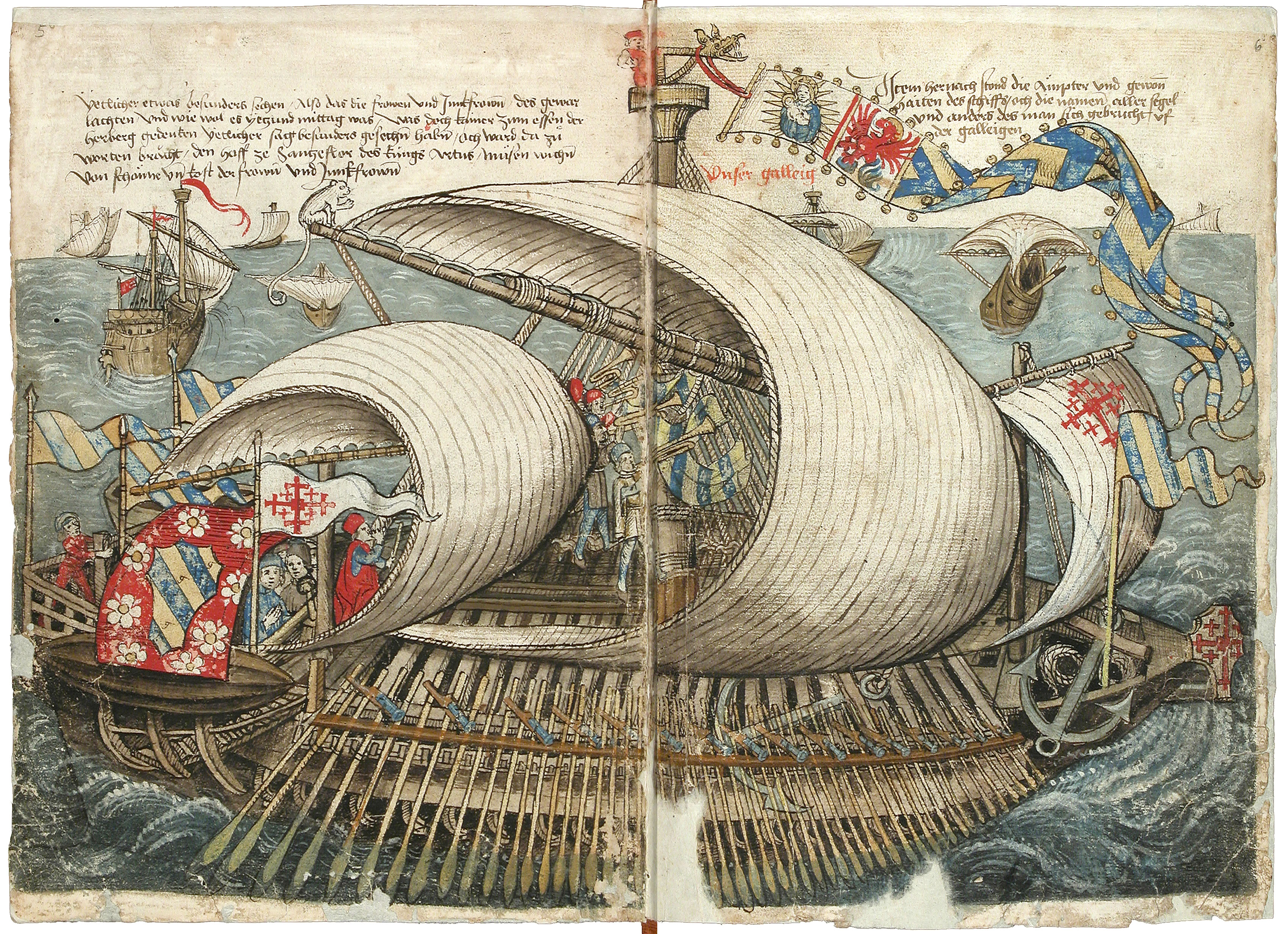 Schilderung einer Pilgerreise von Konstanz nach Jerusalem durch Konrad von Grünenberg, um 1487 Konrad von Grünenberg: Beschreibung der Reise von Konstanz nach Jerusalem - Cod. St. Peter, pap. 32. Handschrift, Bodenseegebiet (Konstanz?), um 1487. II + 53 Blätter, 32x21, mit 31 kolorierten Zeichnungen der Reiseroute von Venedig bis Palästina. Text in alemannischer Mundart.